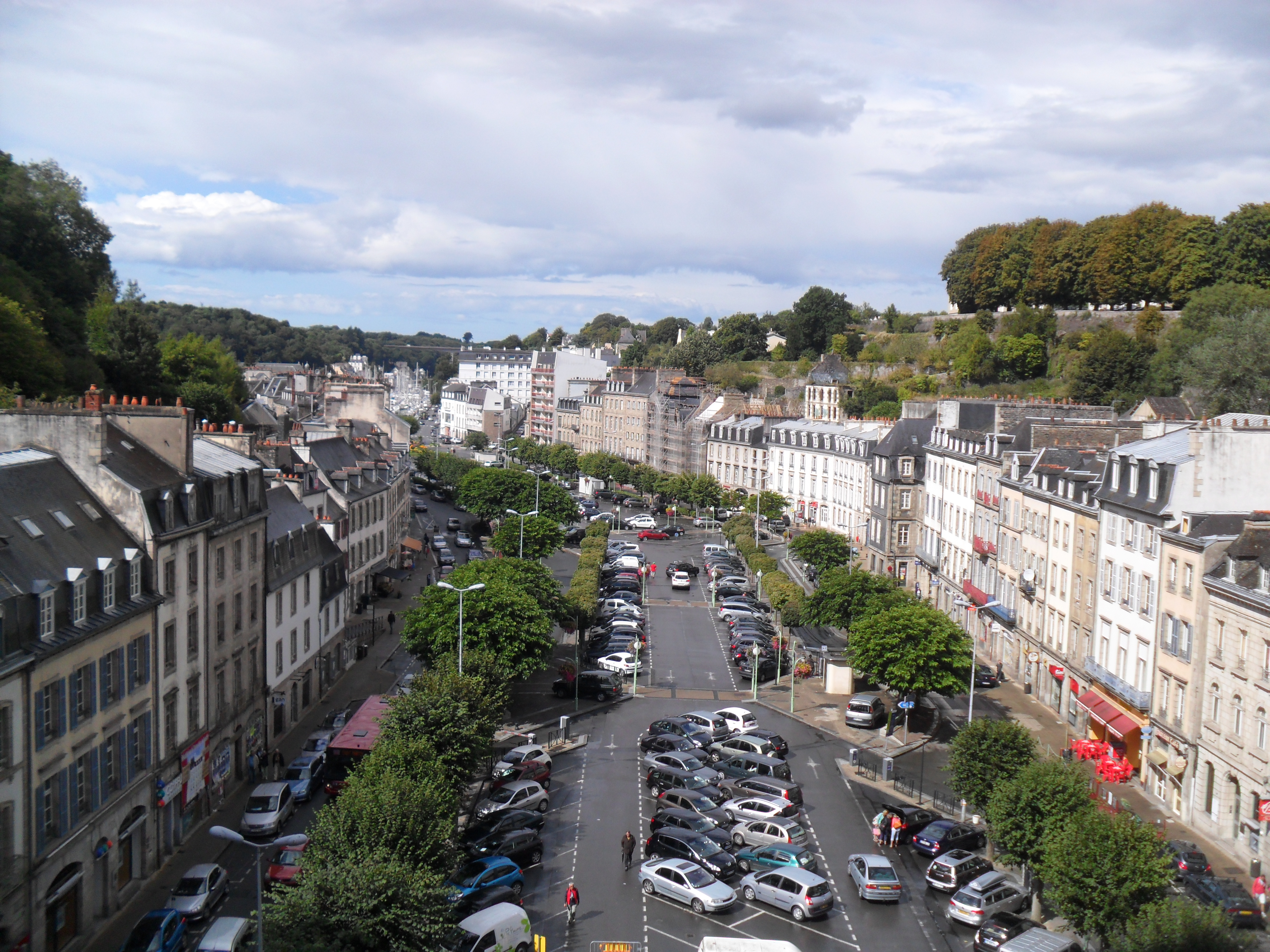 Vue sur la place de Morlaix via le viaduc